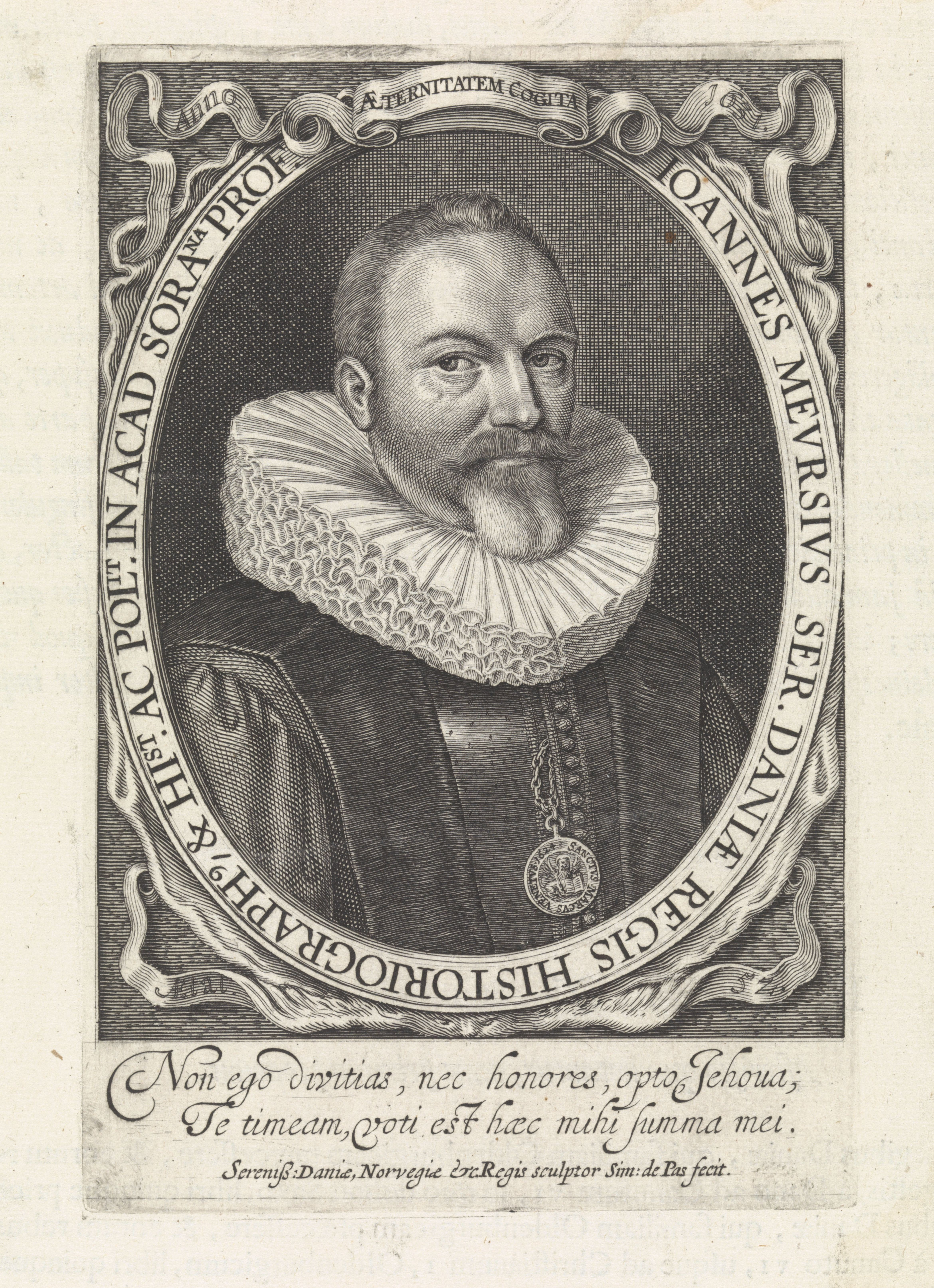 IdentificatieTitel(s): Portret van Johannes MeursiusObjecttype: prent boekillustratie Objectnummer: RP-P-1904-3742Catalogusreferentie: Franken 753Hollstein Dutch 91Van Someren 3647Opschriften / Merken: verzamelaarsmerk, verso, gestempeld: Lugt 2228Omschrijving: Portret van de classicus en historicus Johannes Meursius, op 52-jarige leeftijd. Hij was hoogleraar aan de Universiteit van Leiden en de Universiteit van Sorø. Hij draagt een medaillon met de gevleugelde leeuw van de evangelist Marcus, het symbool van Venetië. In het randschrift van de omlijsting de naam en functie van de geportretteerde in het Latijn. Bovenaan de omlijsting een motto in het Latijn. In de marge een tweeregelig onderschrift in het Latijn.VervaardigingVervaardiger: prentmaker: Simon van de Passe (vermeld op object)Plaats vervaardiging: KopenhagenDatering: 1631Fysieke kenmerken: gravure; boekdruk versoMateriaal: papier Techniek: graveren (drukprocedé) / boekdrukAfmetingen: plaatrand: h 156 mm × b 103 mmToelichtingPrent uit: Johannes Meursius, Historiae Danicae. Amsterdam: J. Blaeu, 1638.OnderwerpWat: lion (possibly with book) ~ symbol of St. MarkWie: Johannes MeursiusVerwerving en rechtenCredit line: Aankoop met steun van de Vereniging RembrandtVerwerving: aankoop 27-sep-1904Copyright: Publiek domein